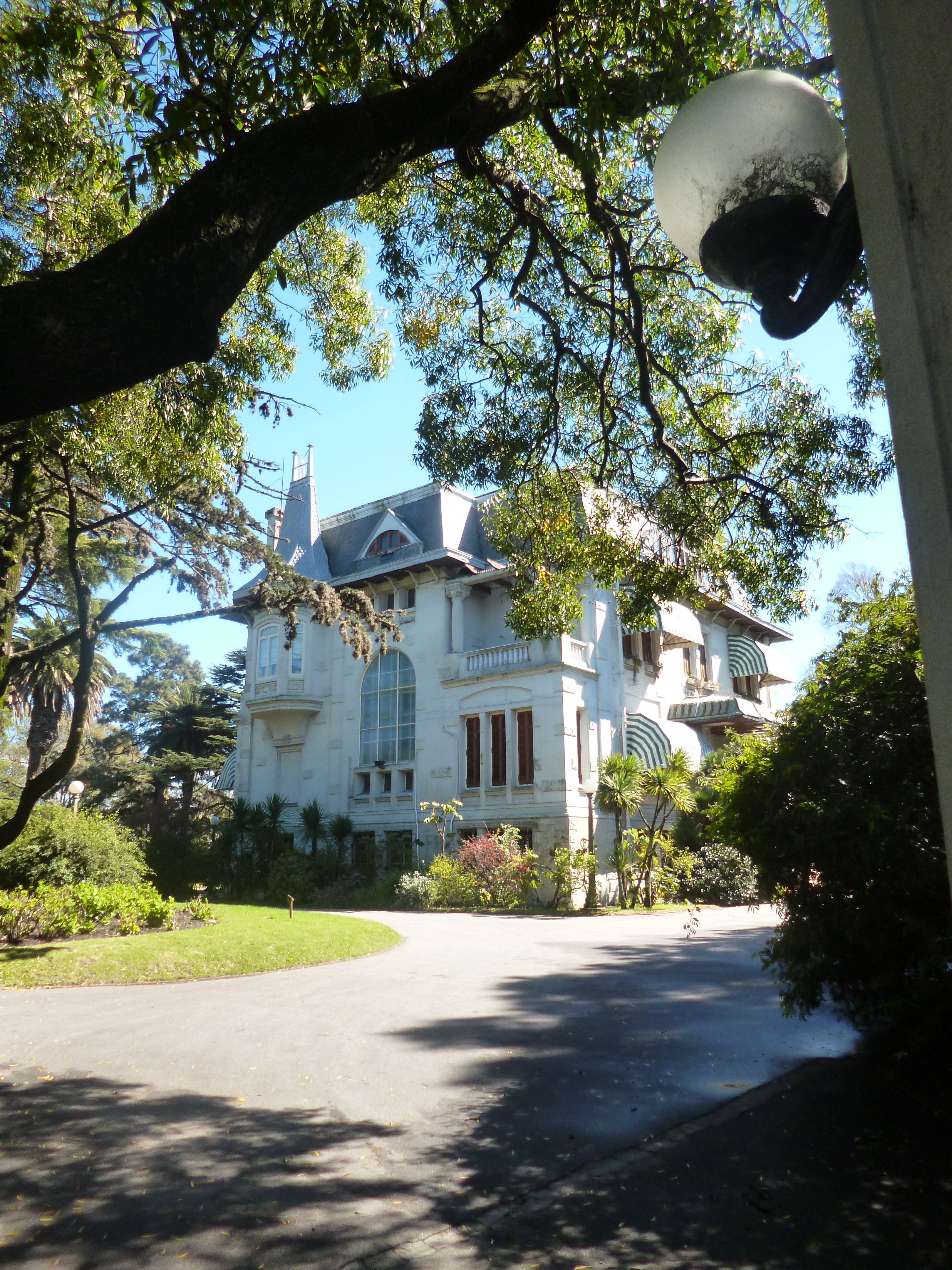 Casa Quinta de Susviela Guarch - Residencia Presidencial. Ubicada en el departamento de Montevideo